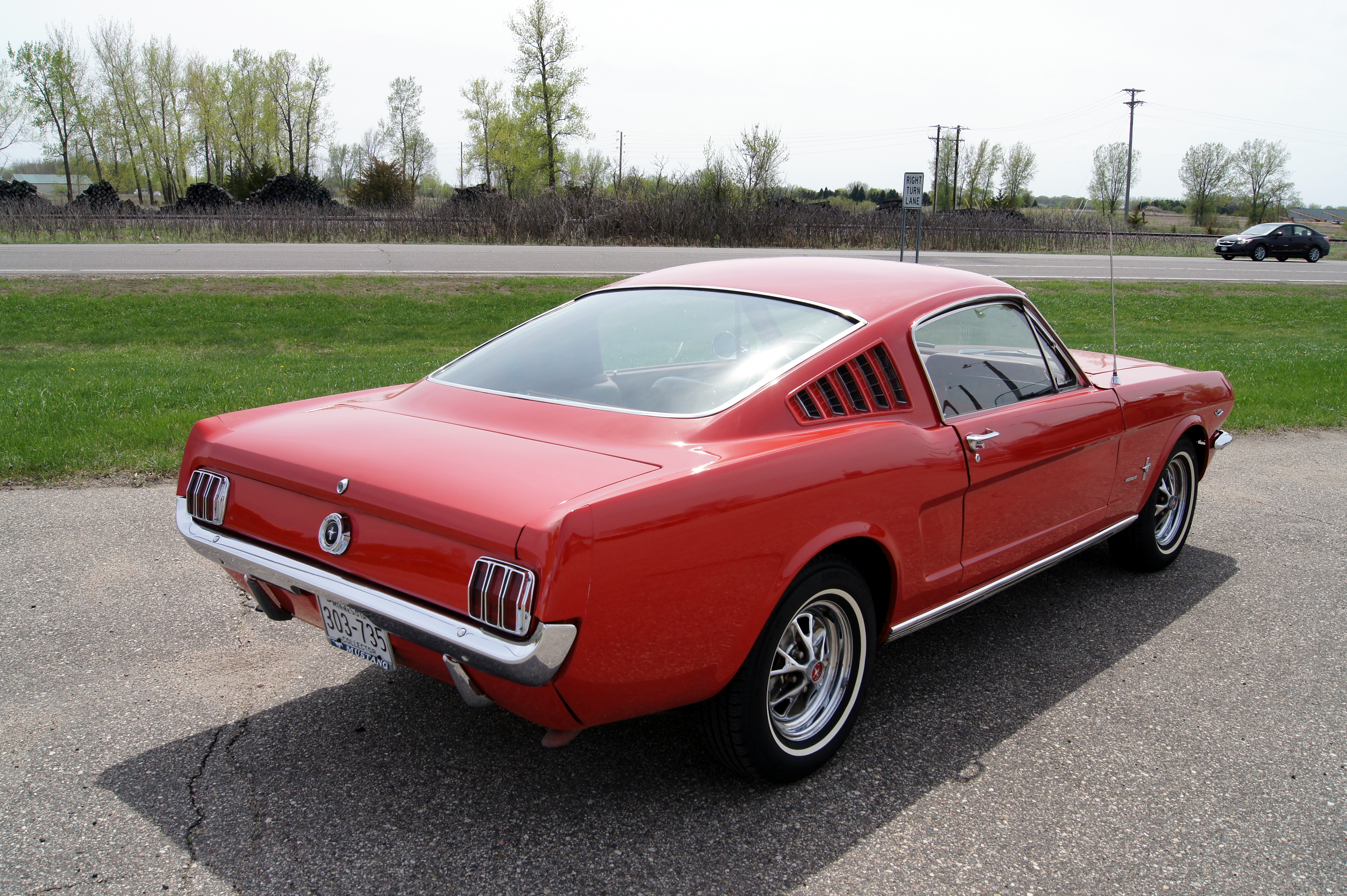 65 Ford Mustang 2 2